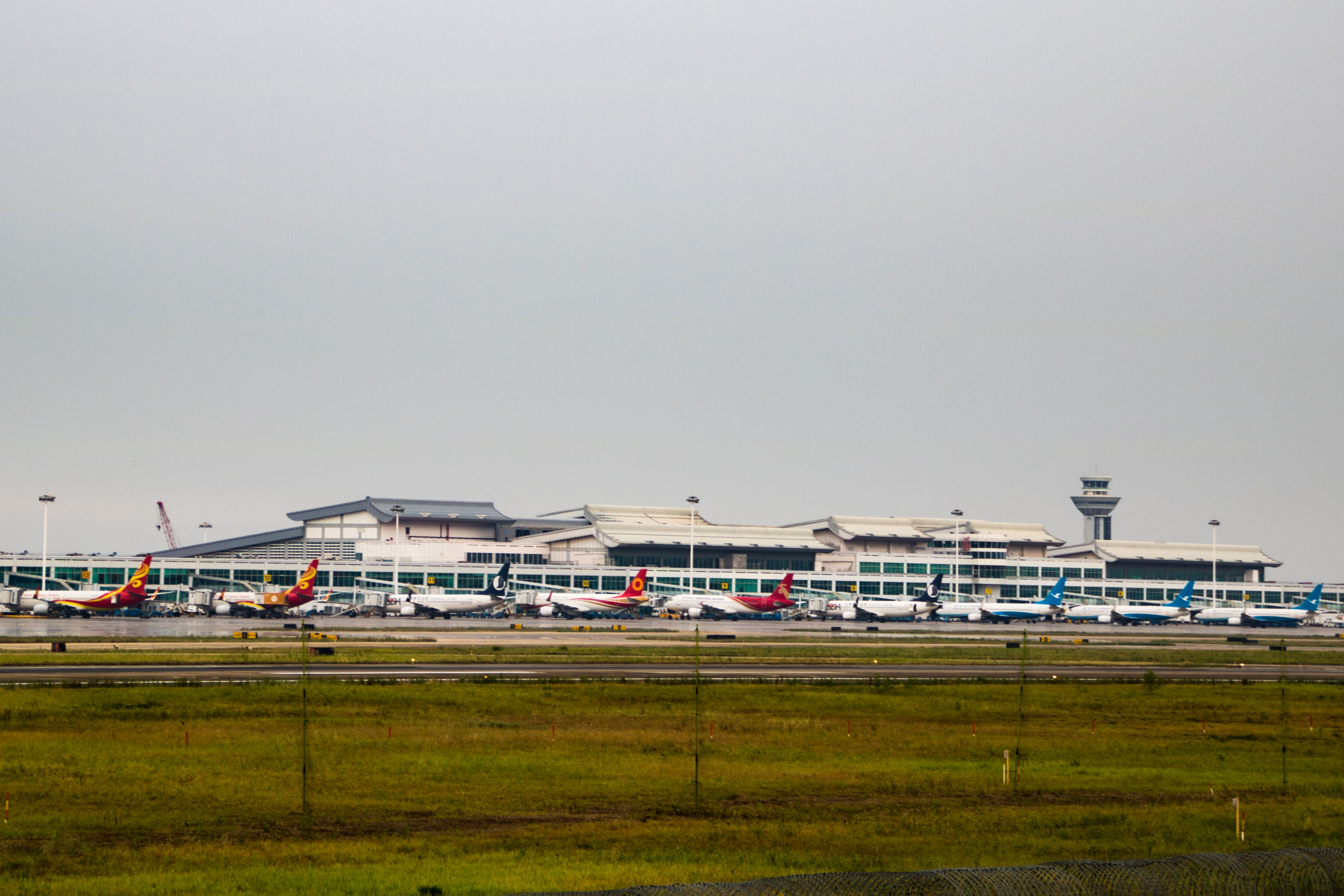 福州长乐国际机场航站楼